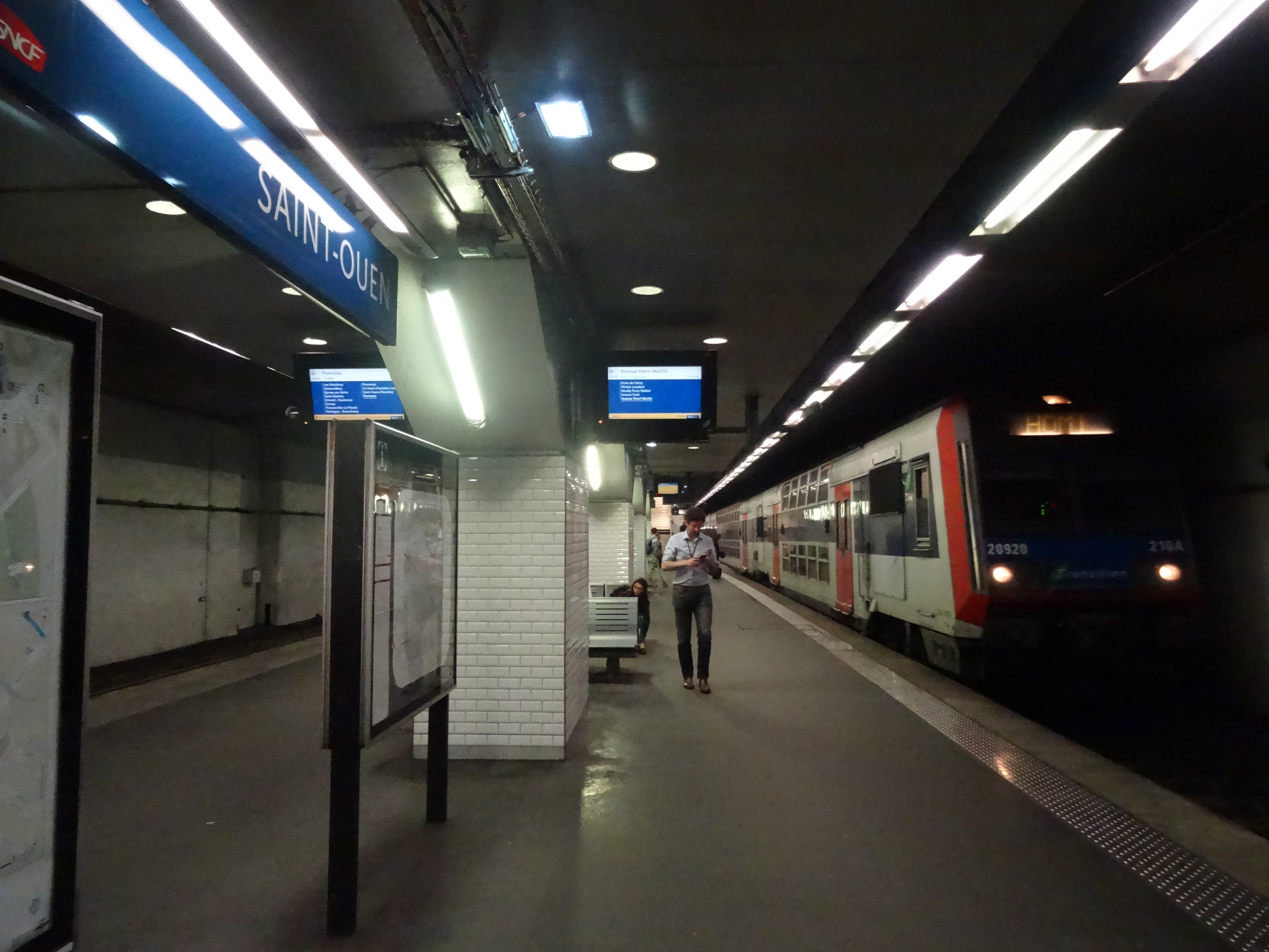 Les quais de la gare de Saint-Ouen, Seine-Saint-Denis, France.